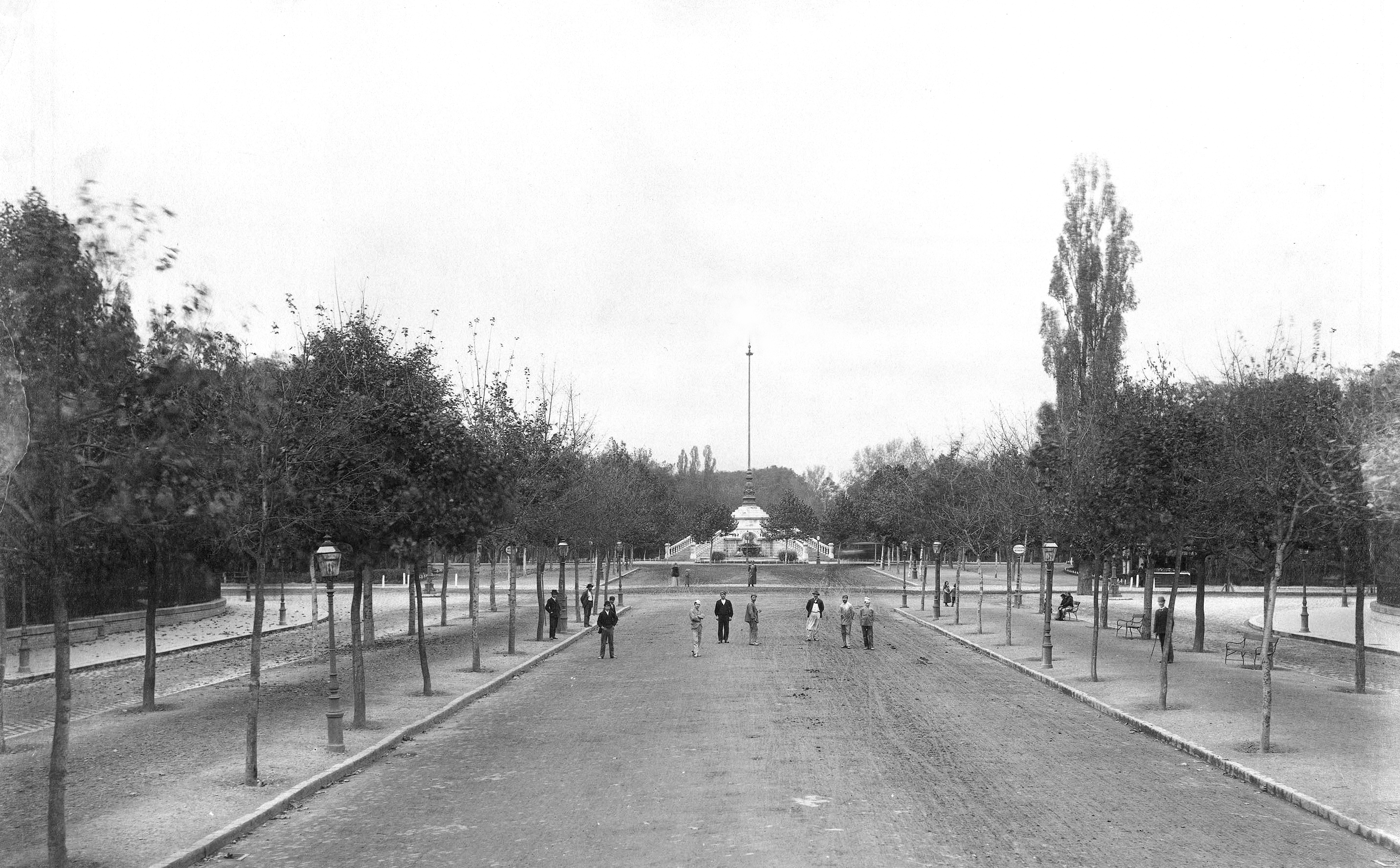 A mai Hősök terén állt a Gloriette. Fényképfelvétel az Andrássy út felől a Városliget felé nézve. A háttérben az Ybl-féle Gloriette (díszkút) látszik, ma Széchenyi-emlékmű és -kilátó a Széchenyi-hegyen. A felvétel az 1890-es évek elején készült. A kép forrását kérjük így adja meg: Fortepan / Budapest Főváros Levéltára. Levéltári jelzet: HU.BFL.XV.19.d.1.07.140